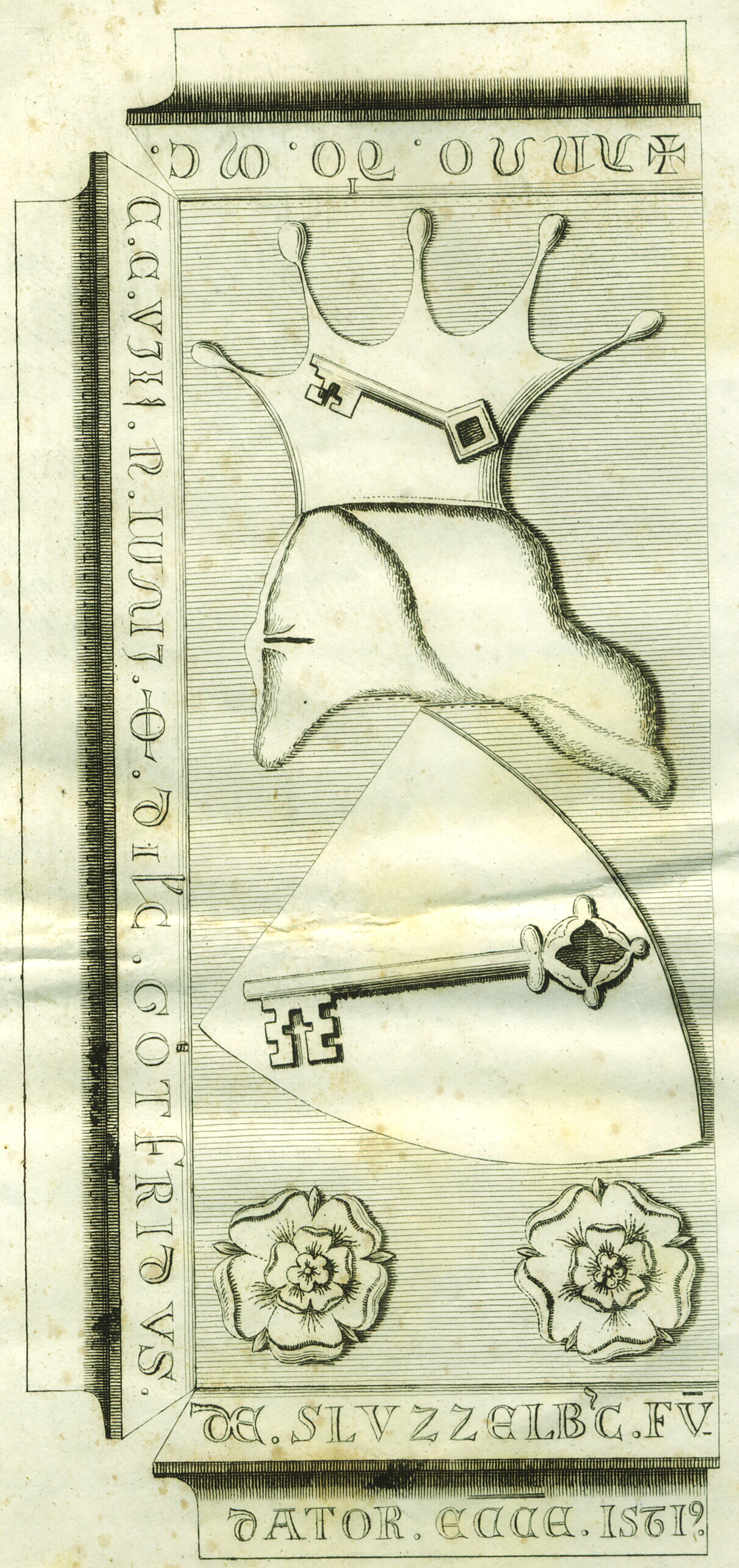 Grabmal des Klosterstifters Gottfried von Schlüsselberg in der Kirche von Schlüsselau